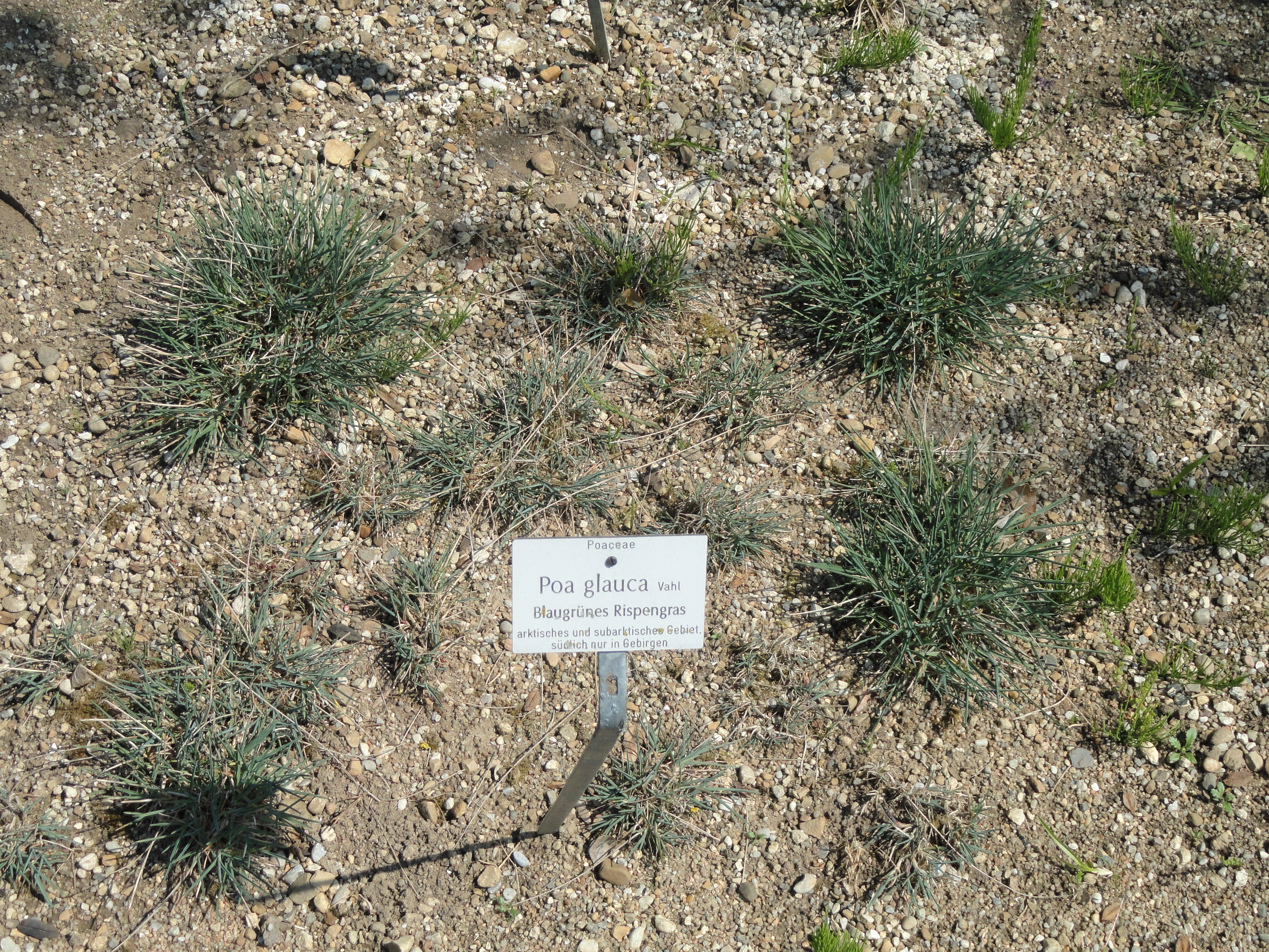 Poa glauca specimen in the Botanischer Garten München-Nymphenburg, Munich, Germany.